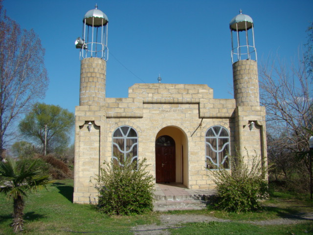 2004-cü ildə kənd sakini Hacı Rövşən Vəli oğlu Quliyevin şəxsi vəsaiti ilə tikilmiş məscid.